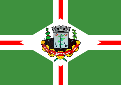 Bandeira de Naviraí, Brasil